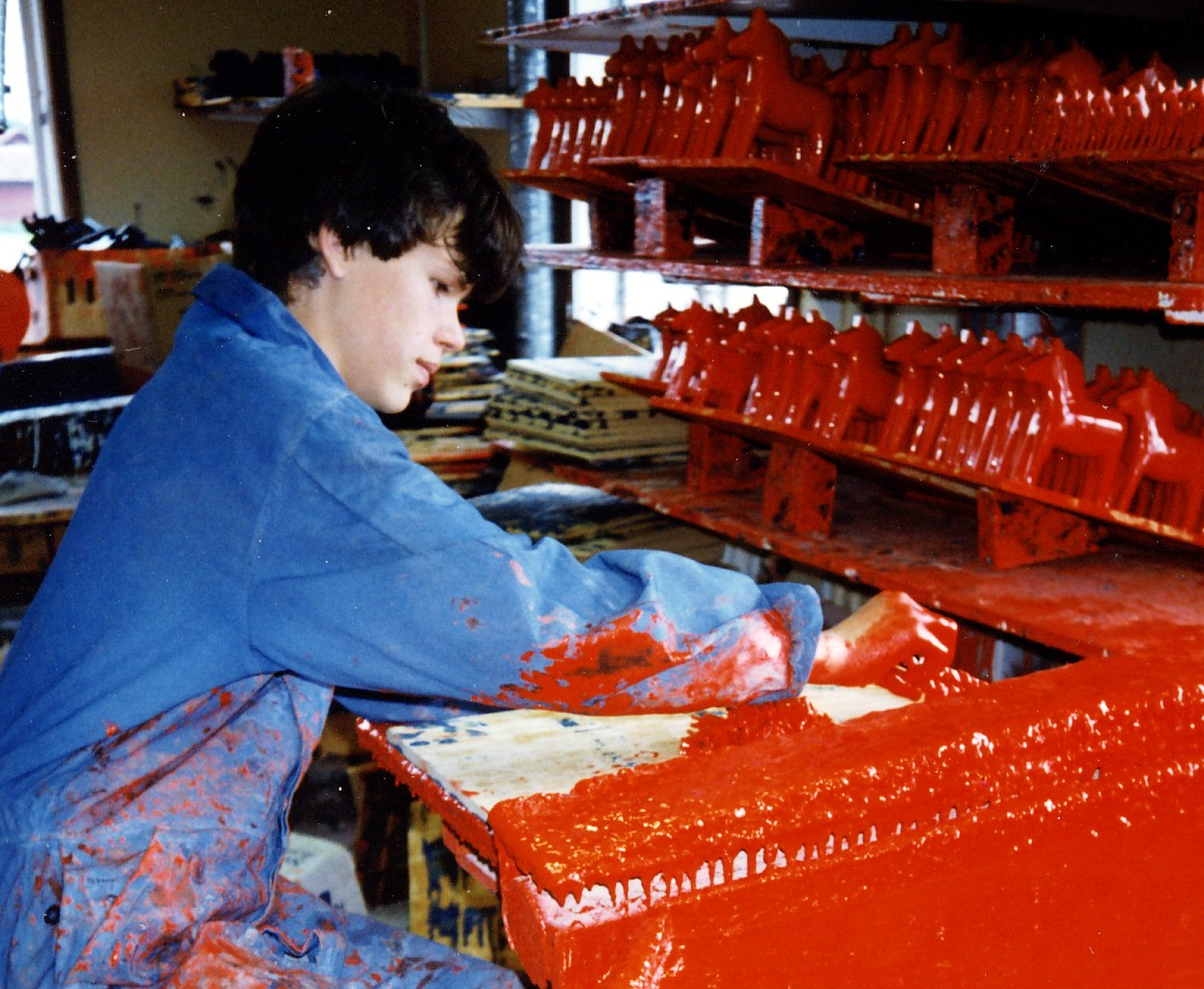 Dalahästtillverkning